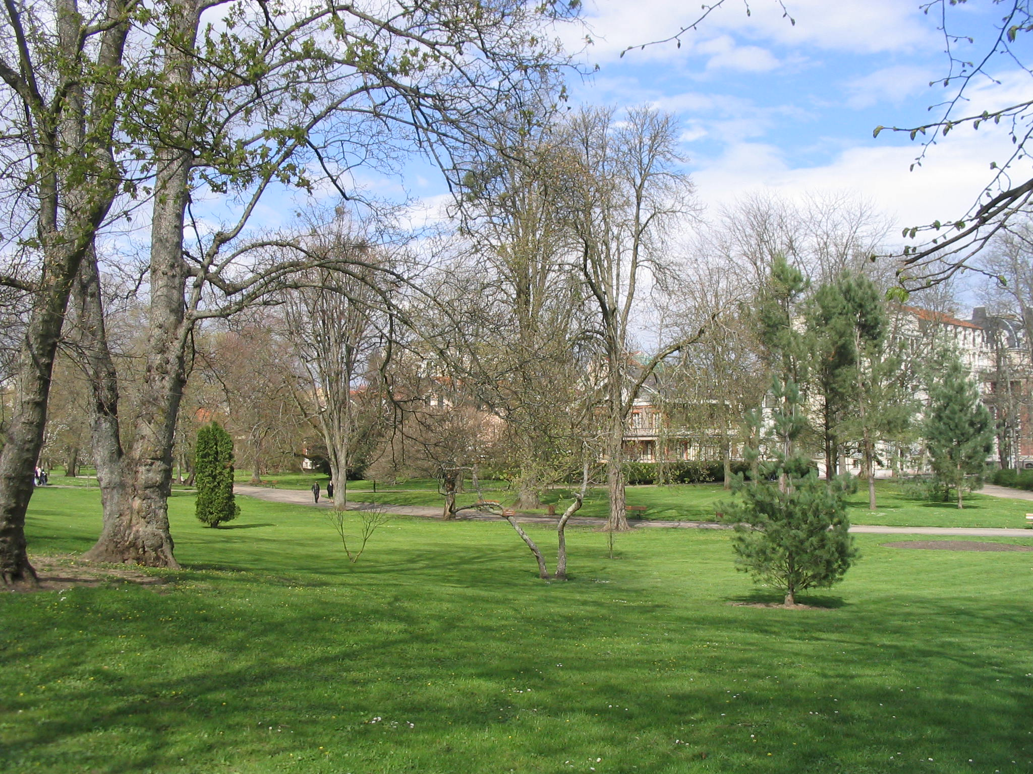 Le parc Napoléon III à Vichy (Allier, France).